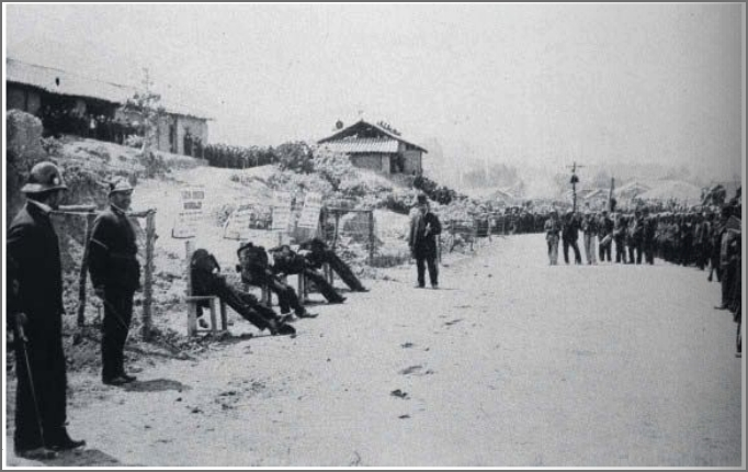 Cadáveres de los condenados expuestos ante la población como escarmiento a los opositores